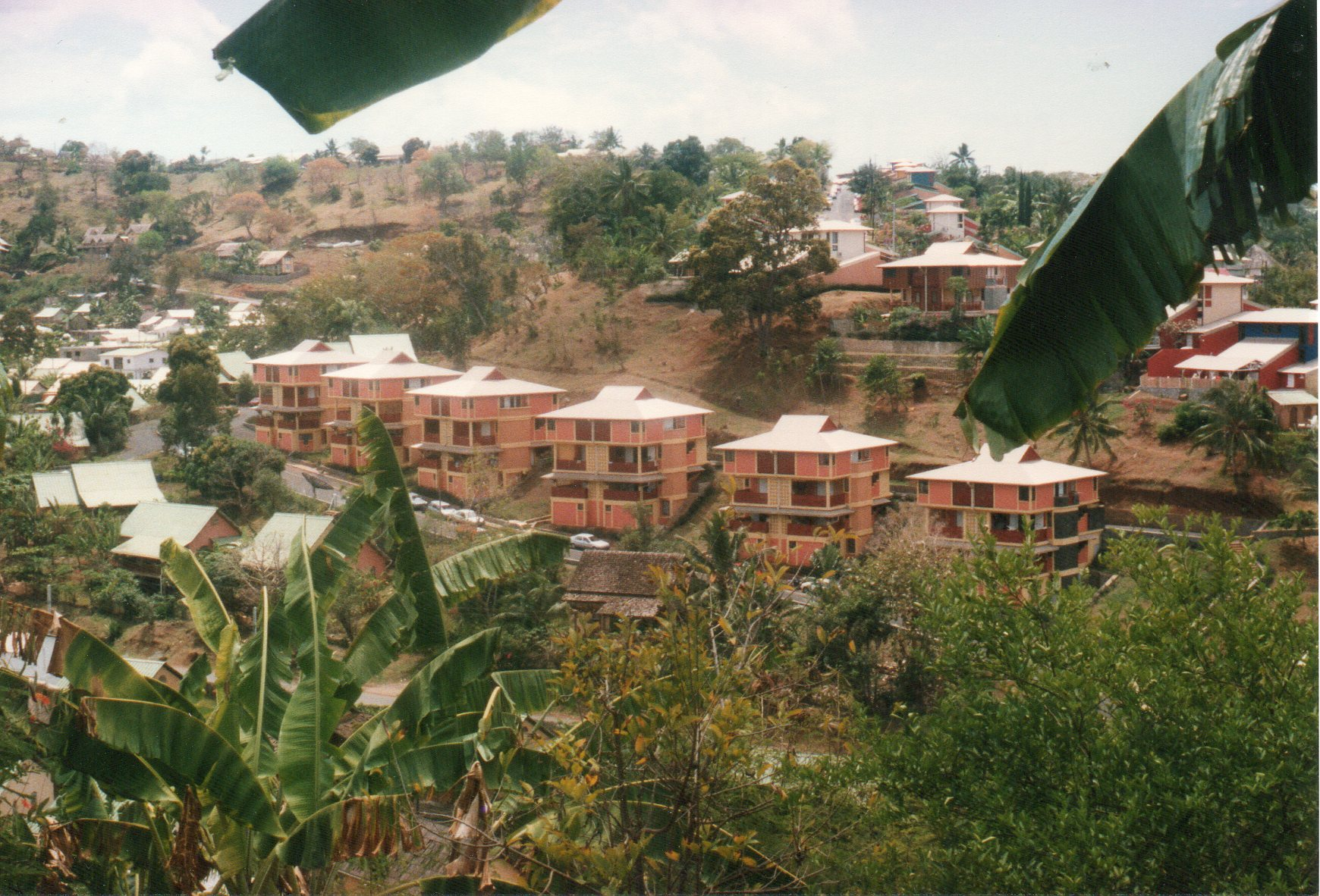 Résidences SIM vues depuis Mandzarisoa.